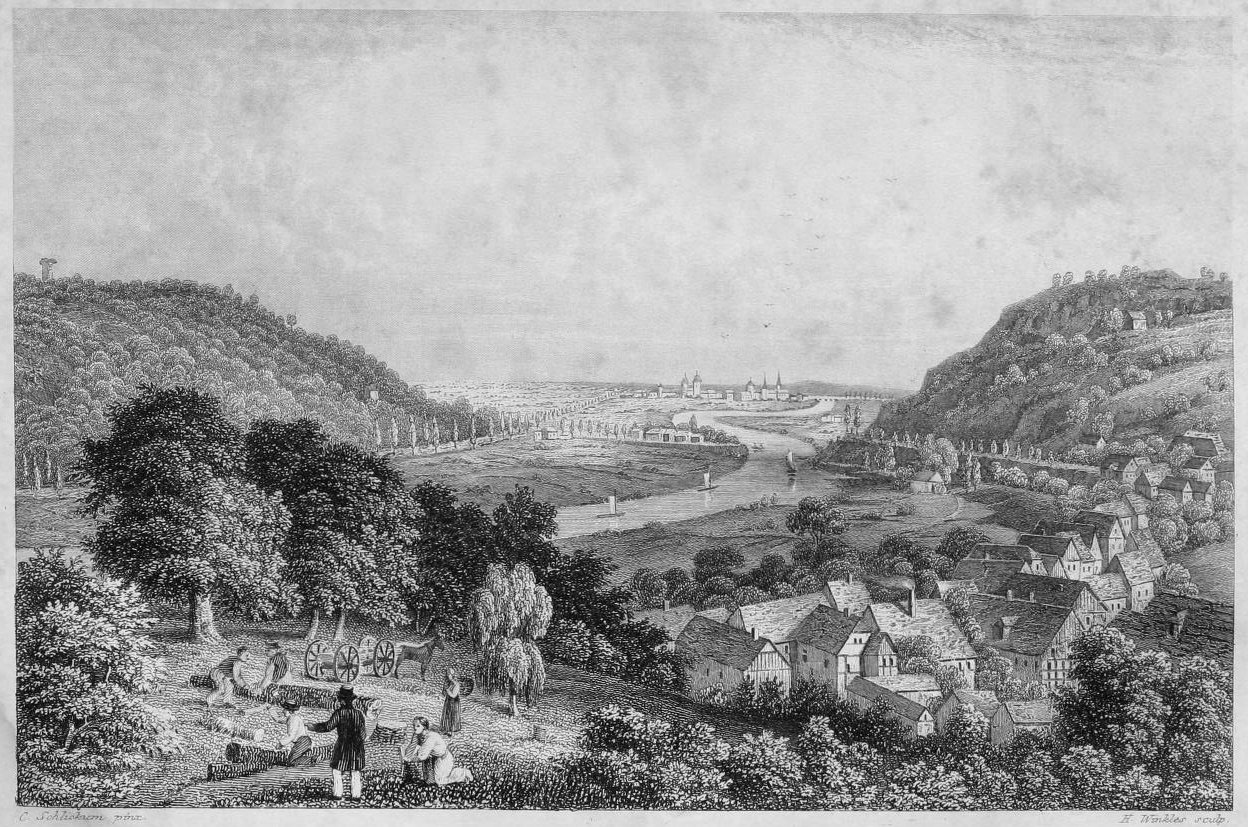 Porta Westfalica um 1841, im Hintergrund Minden